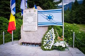 אבנטרדת אסון היסעור ברומניה